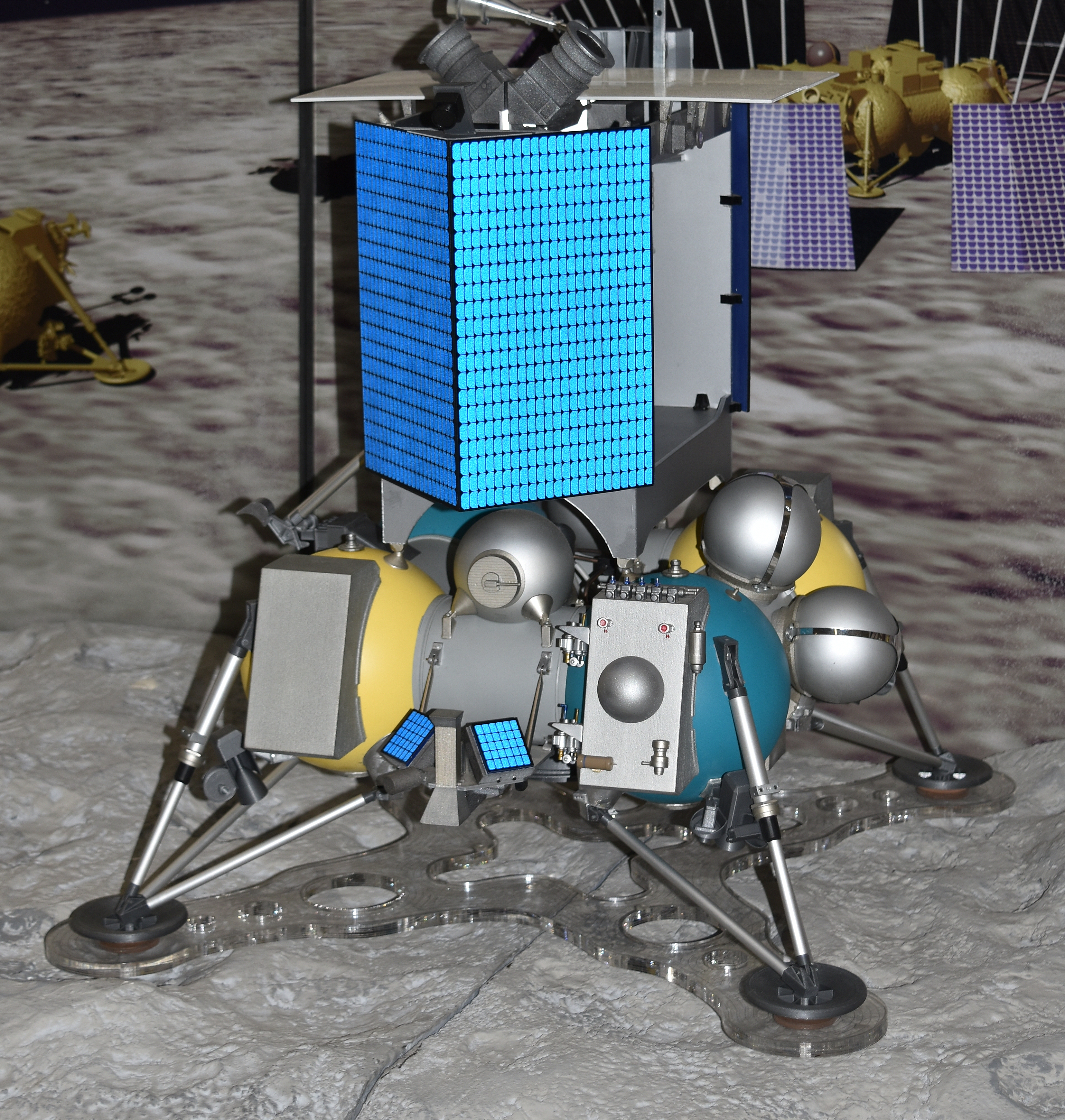 Maquette Luna-Glob Lander, Salon du Bourget 2015